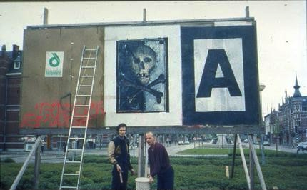 Action in Den Bosch